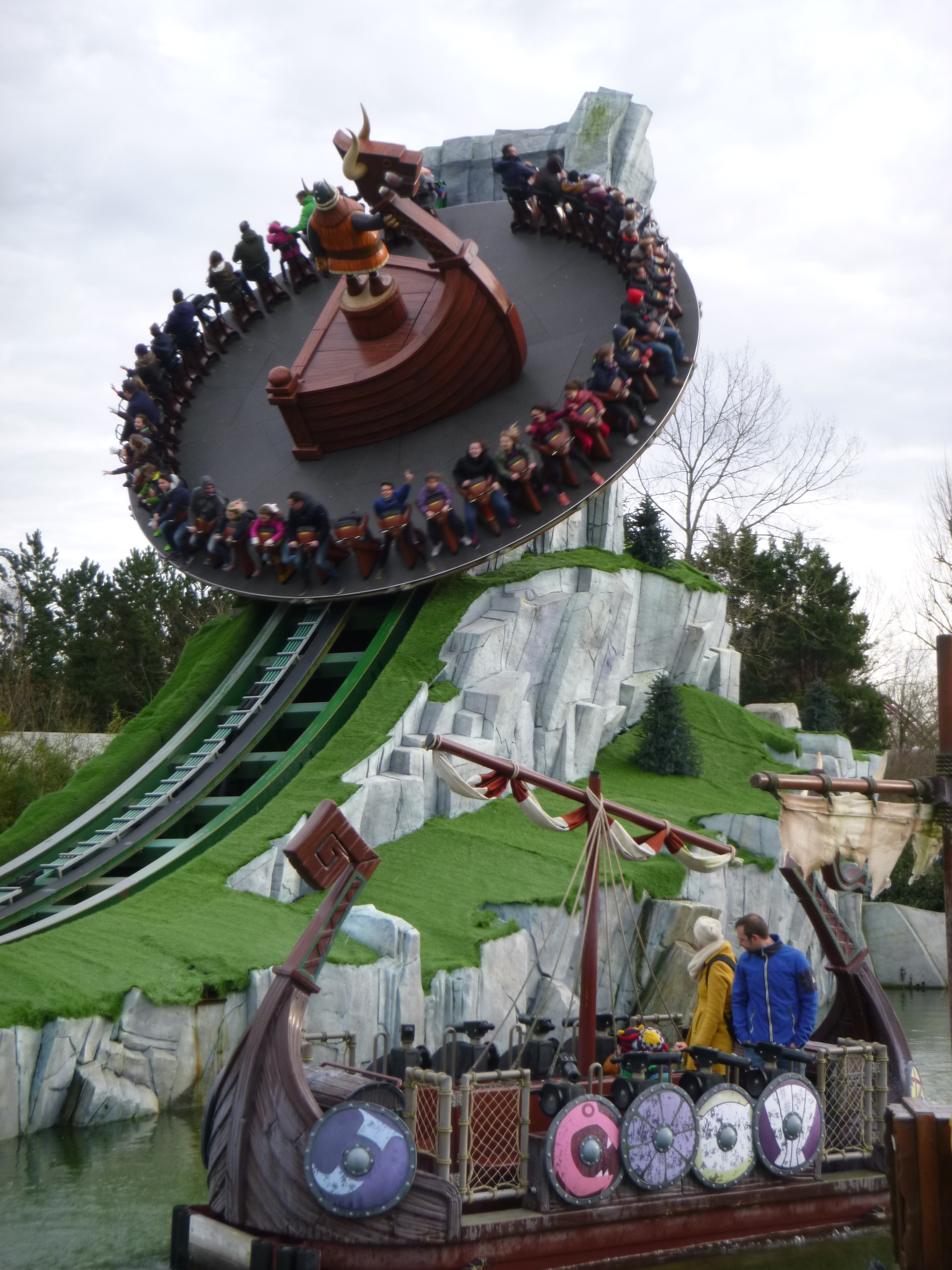 Grande vague et Wickie The Battle à Plopsaland